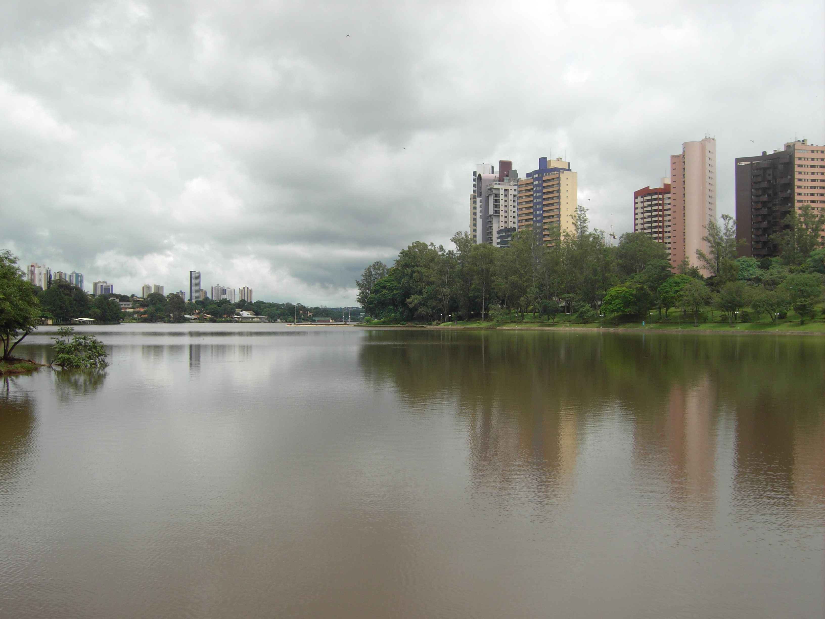 Template:Lago Igapó, Londrina-PR, Brasil